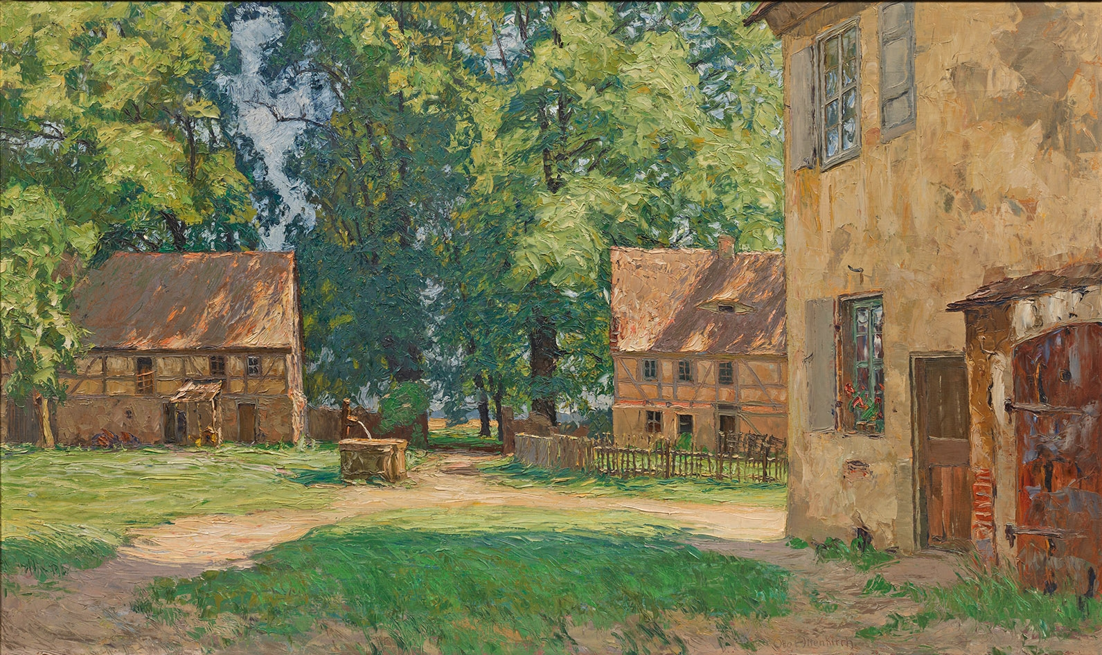 "Sommertag im Hellergut". Öl auf Leinwand, rechts unten signiert, verso vom Künstler bezeichnet und betitelt, 84,5 cm x 144 cm